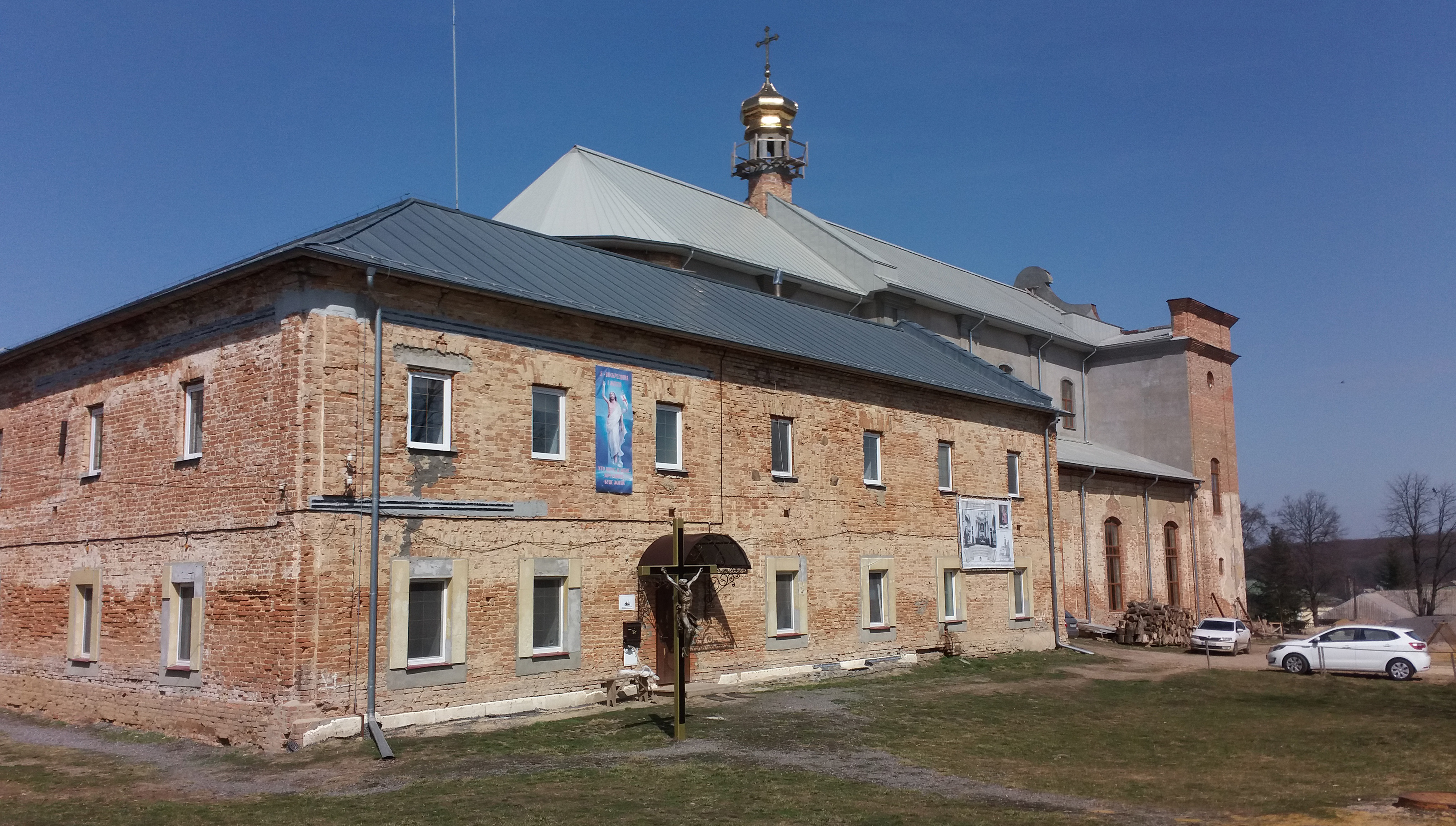 Костел Архангела Михаїла у Тиврові, Вінницька область, Україна